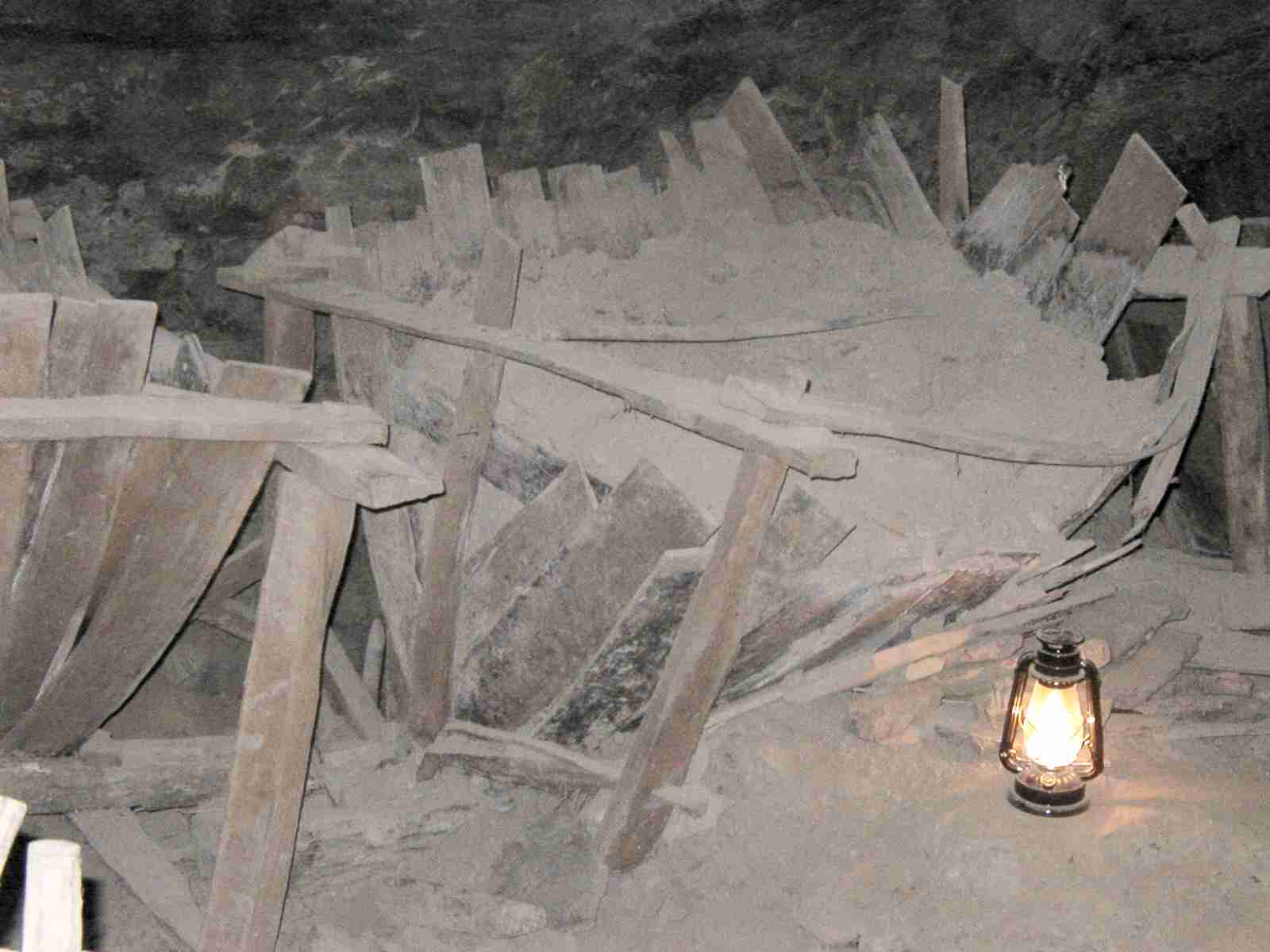 Saltpeter vats in Organ Cave, West Virginia, USA